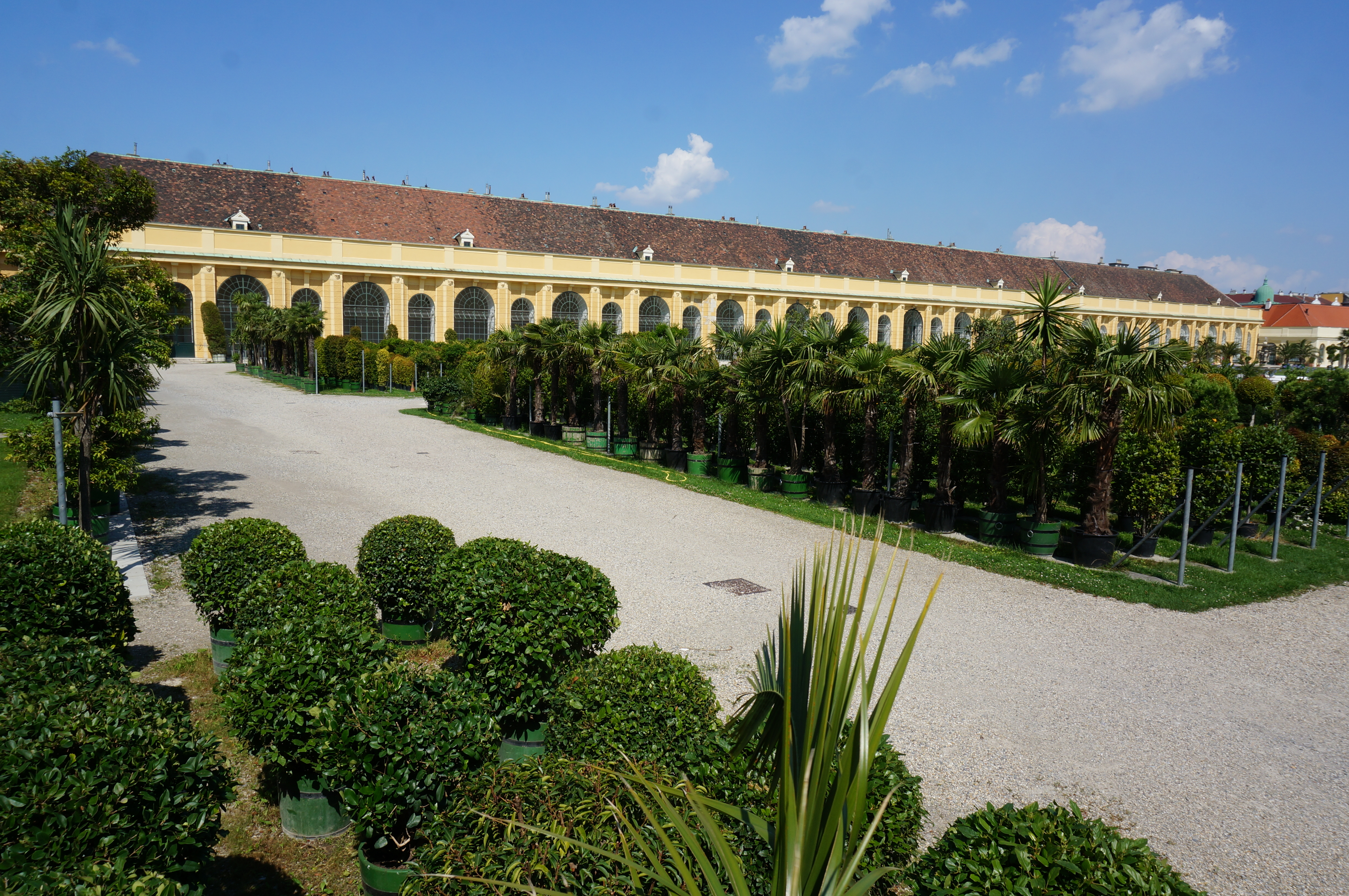 Orangerie Schönbrunn